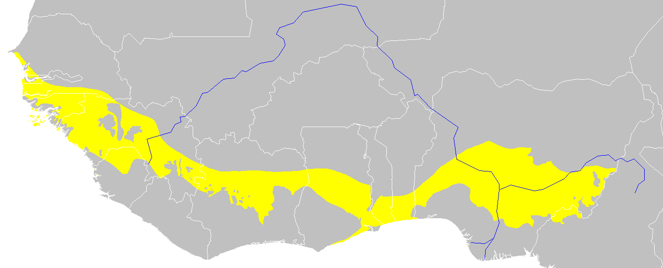 Guinean forest-savanna mosaic ecoregion map